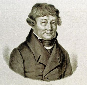 Philippe Bridel (1757-1845), écrivain et poète suisse.